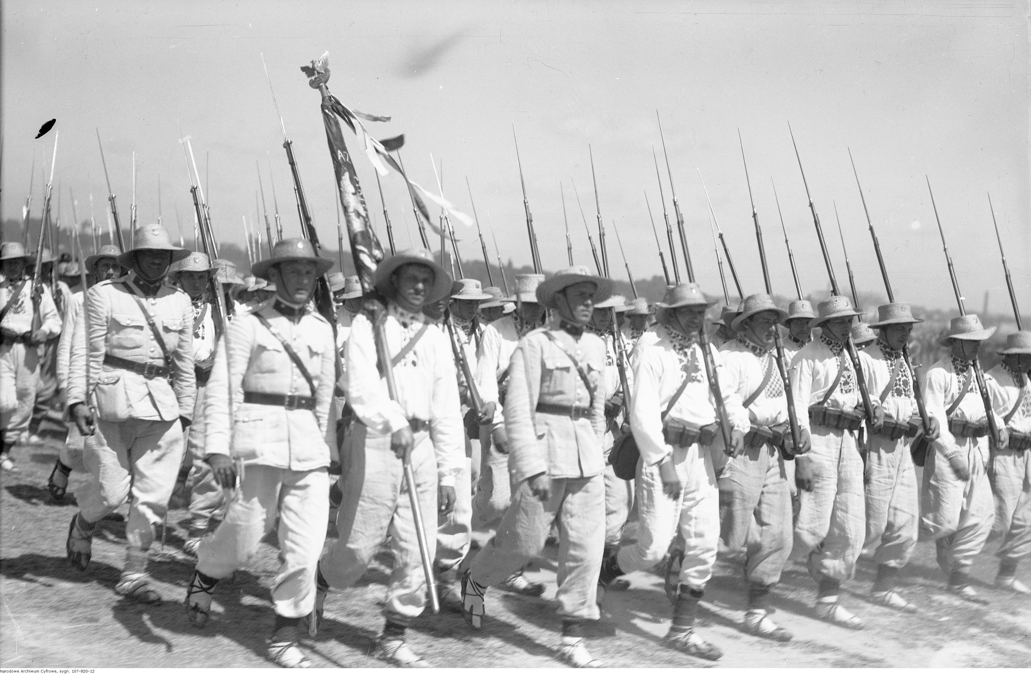 Defilada Poleszuków.